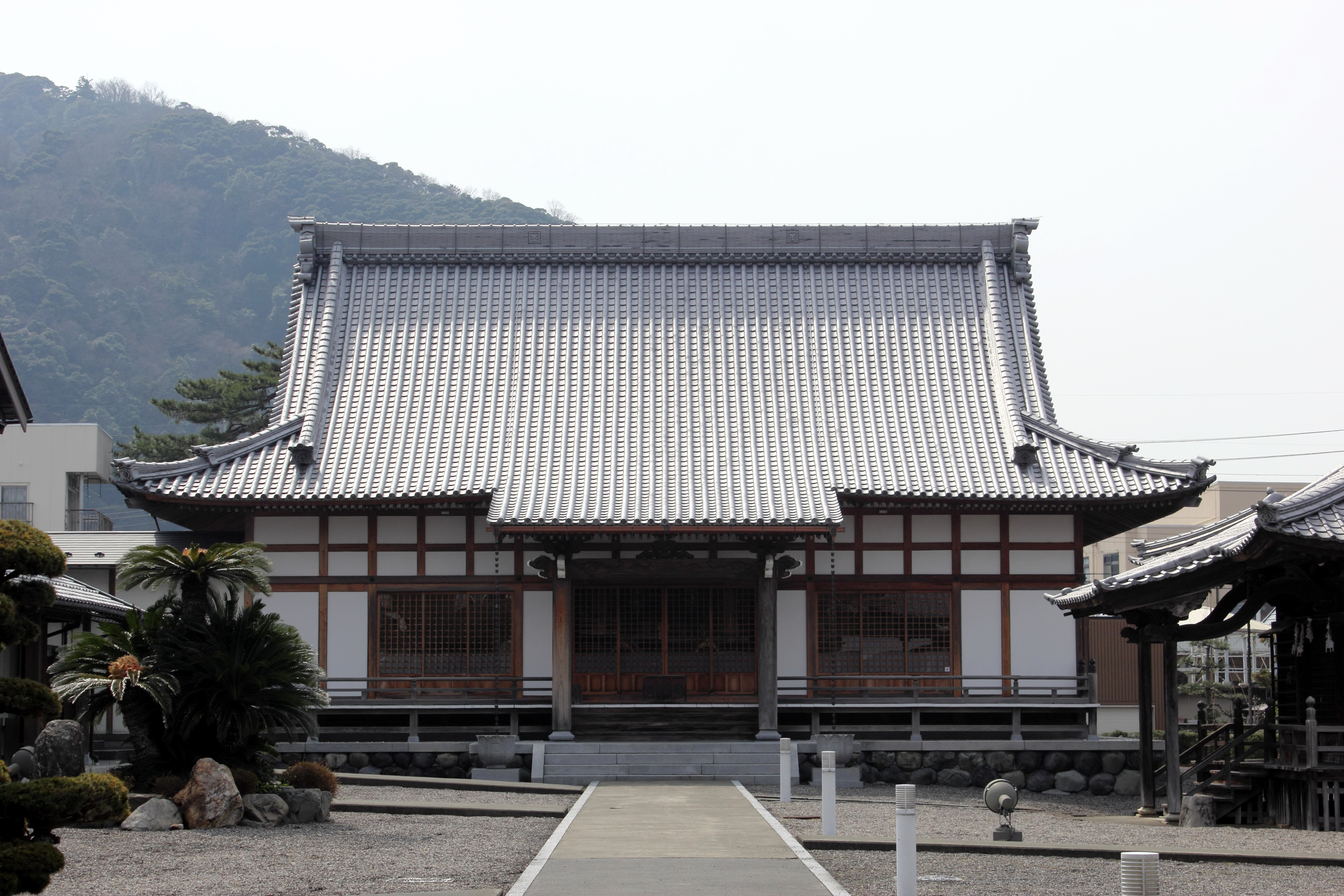 長源寺 本堂(小浜市)